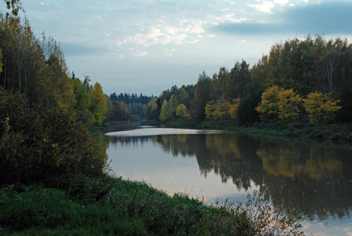 Outdoors area near Pihlajamäki